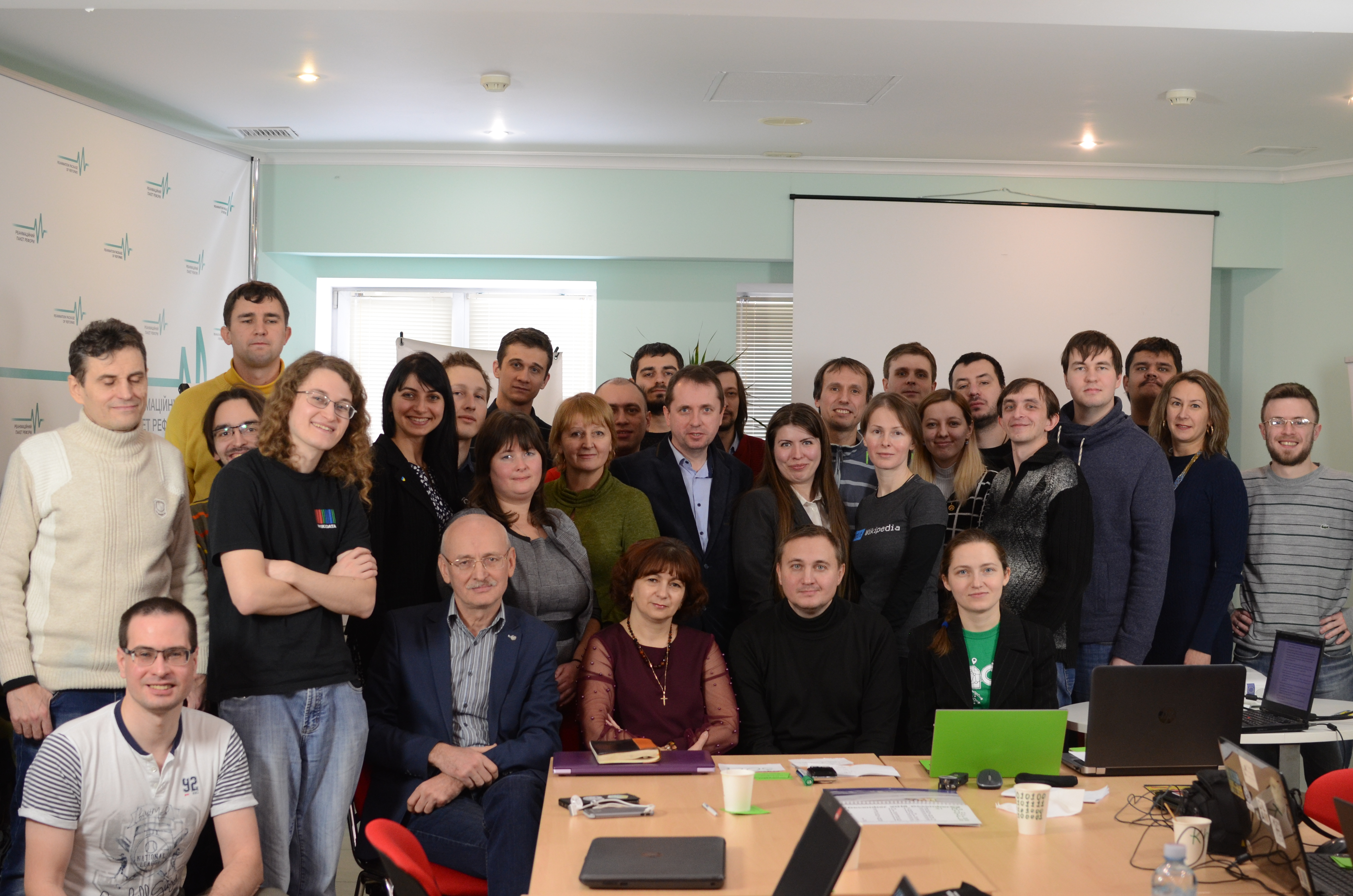 Чергові Загальні збори ГО «Вікімедіа Україна», 25 грудня 2018 року